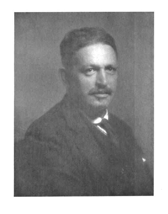 Vincenzo De Simone (Villarosa, 19 novembre 1879 – Milano, 12 aprile 1942).jpg